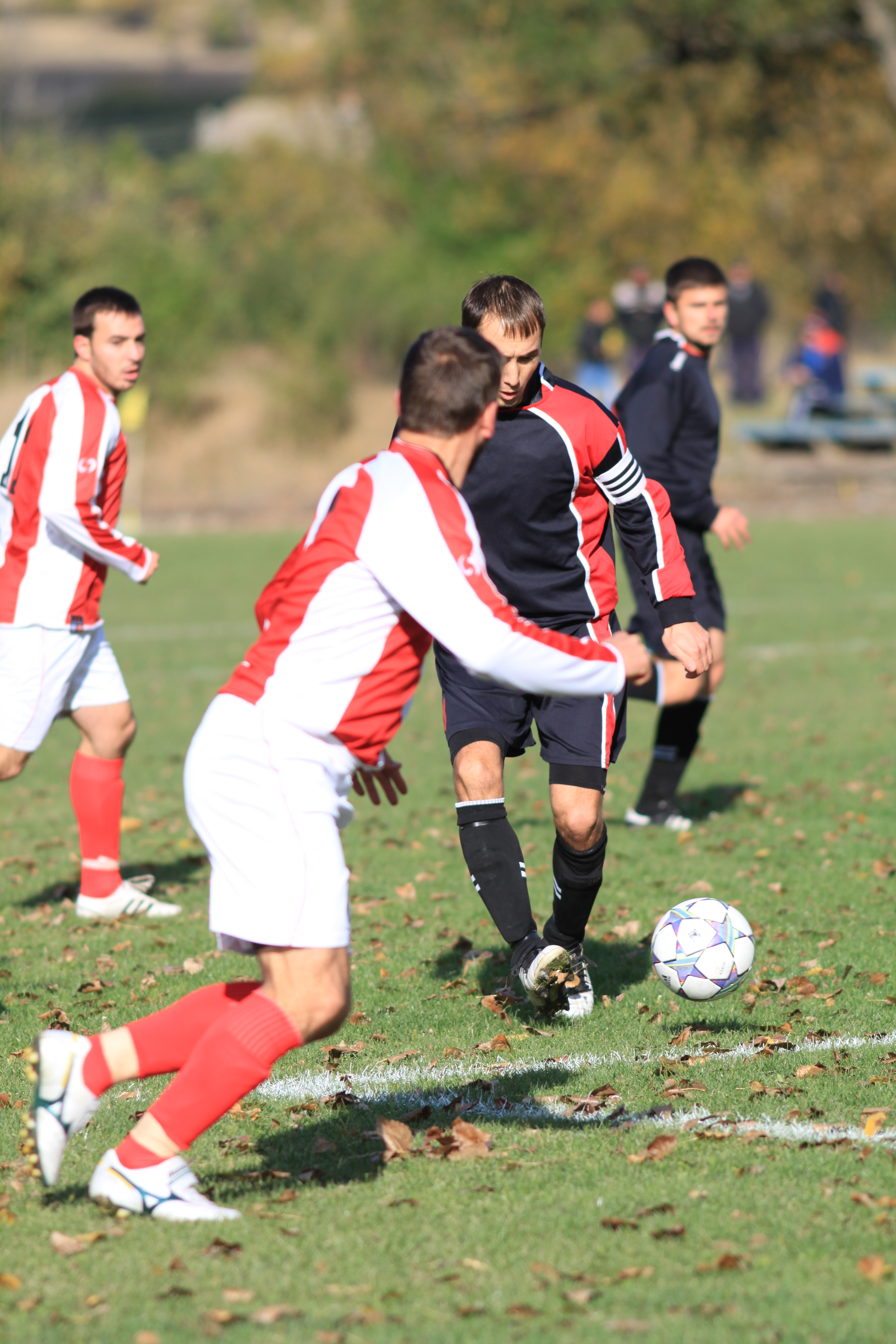 Момент от футболната среща Костинброд-Места Хаджидимово, от ЮЗ "В" АФГ, 2011 година.